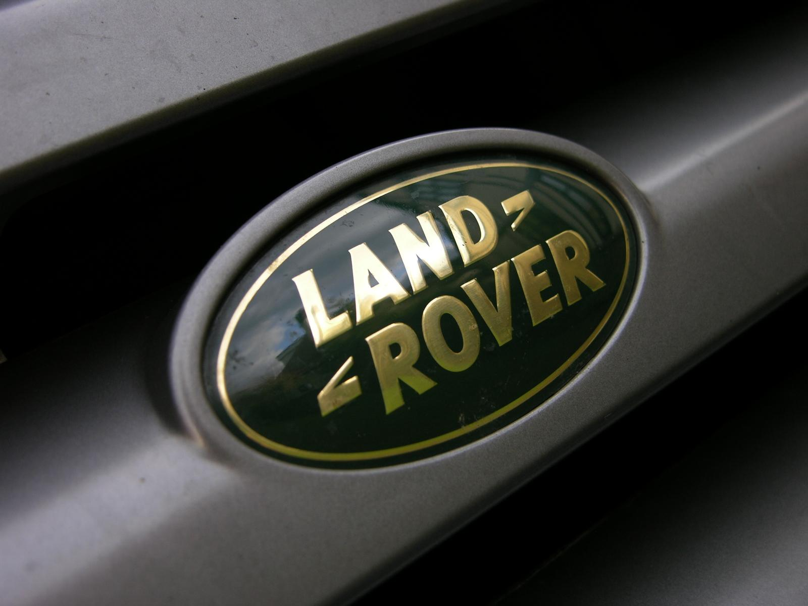 2004 Range Rover V8 Vogue LPG